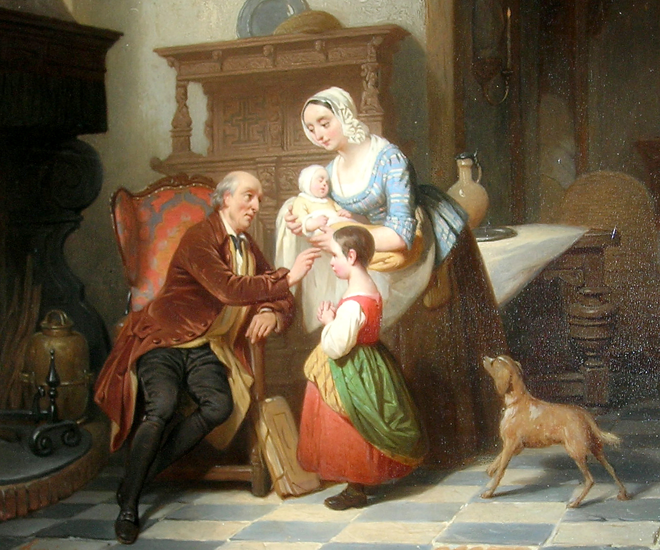 Alois Hunin (1806-1865): Bénédiction paternelle